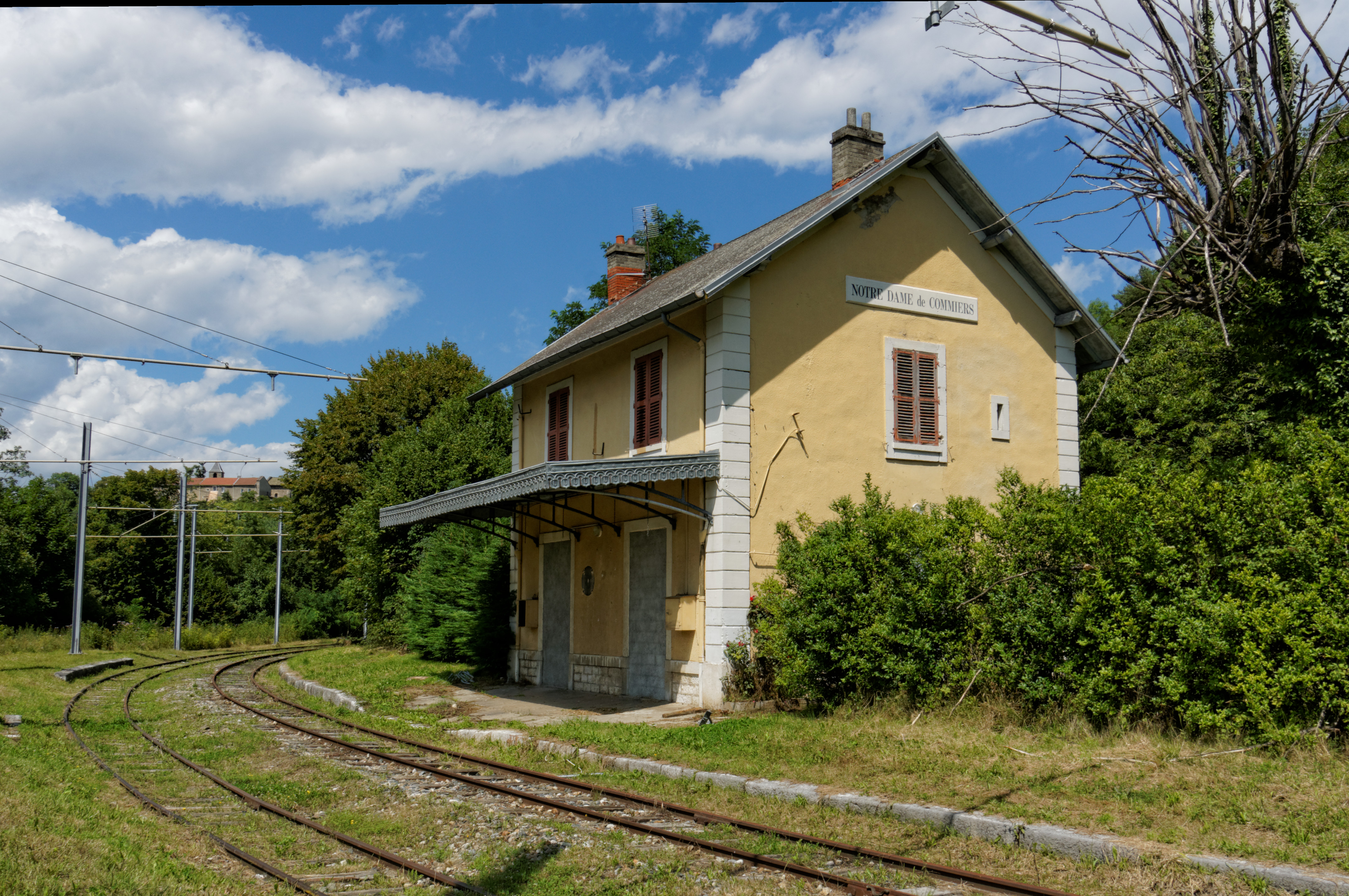 Ancienne gare de Notre-Dame-de-Commiers sur la ligne du chemin de fer de la Mure